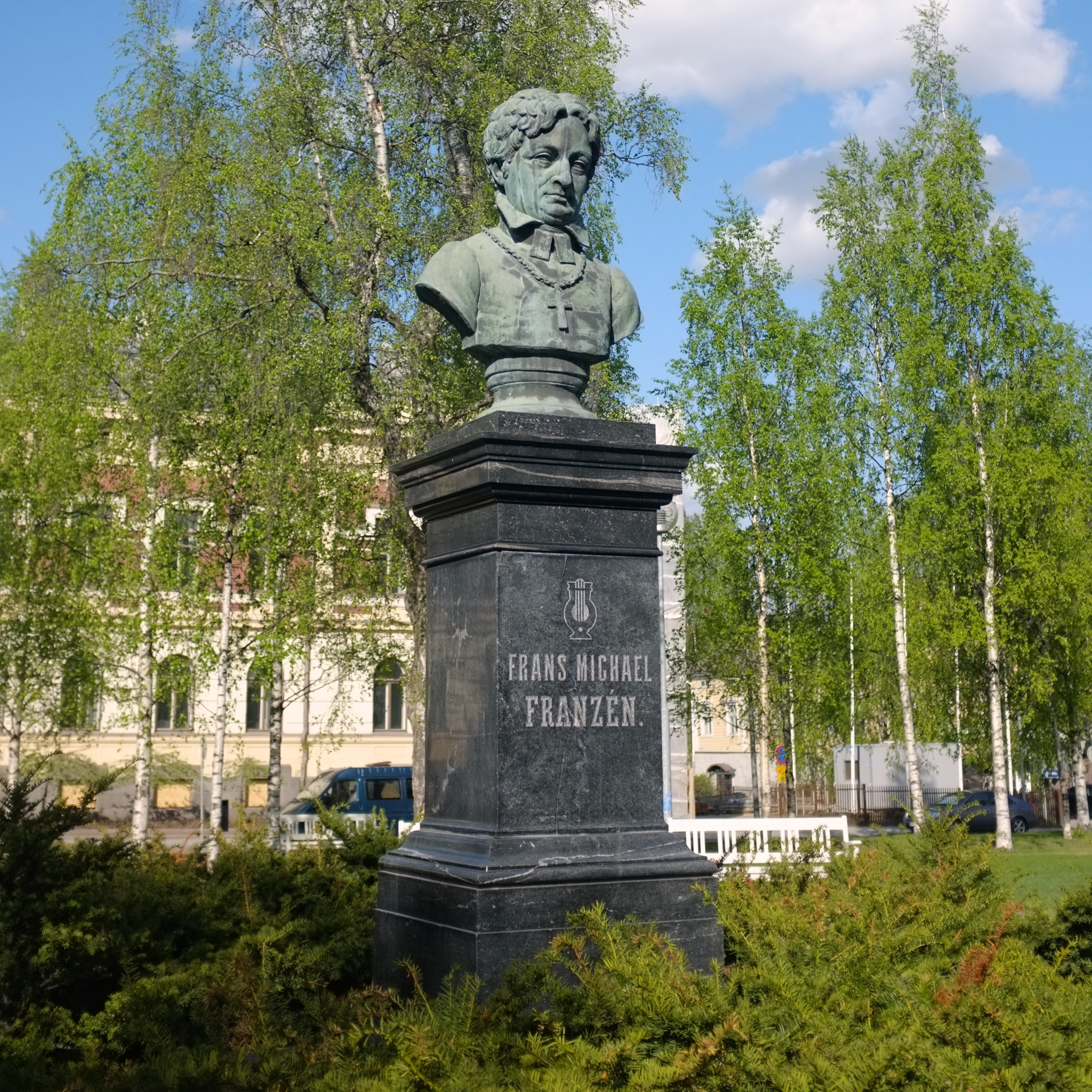 Frans Mikael Franzénin patsas (1879) - Erland Stenberg. Sijainti: Franzéninpuisto, Pokkinen, Oulu keskusta